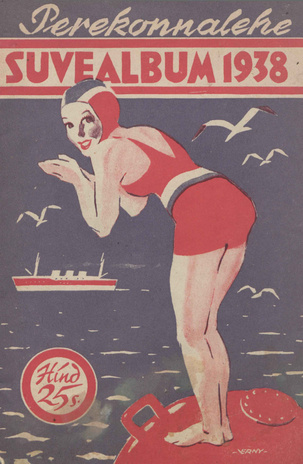 Werner Birkenfeldt kaanekujundus Perekonnalehe Suvealbum 1938